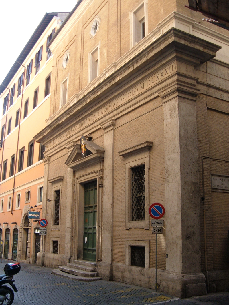 Oratorio di San Francesco Saverio, nel rione Pigna, a Roma.